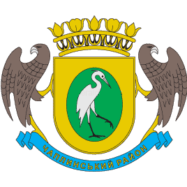 Герб Чаплинського району